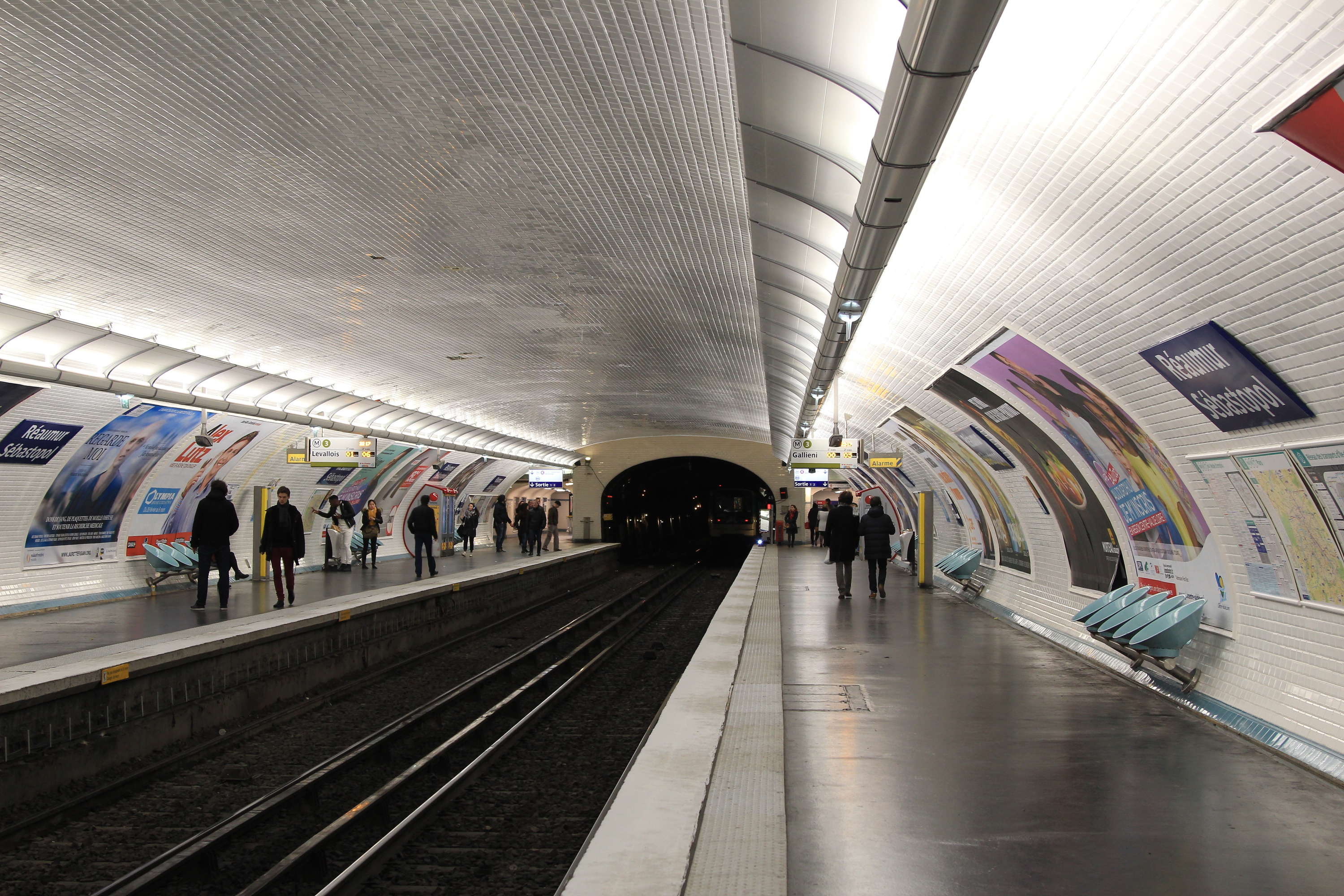 Vue en direction de Gallieni de la station du métro parisien Réaumur - Sébastopol (ligne 3).